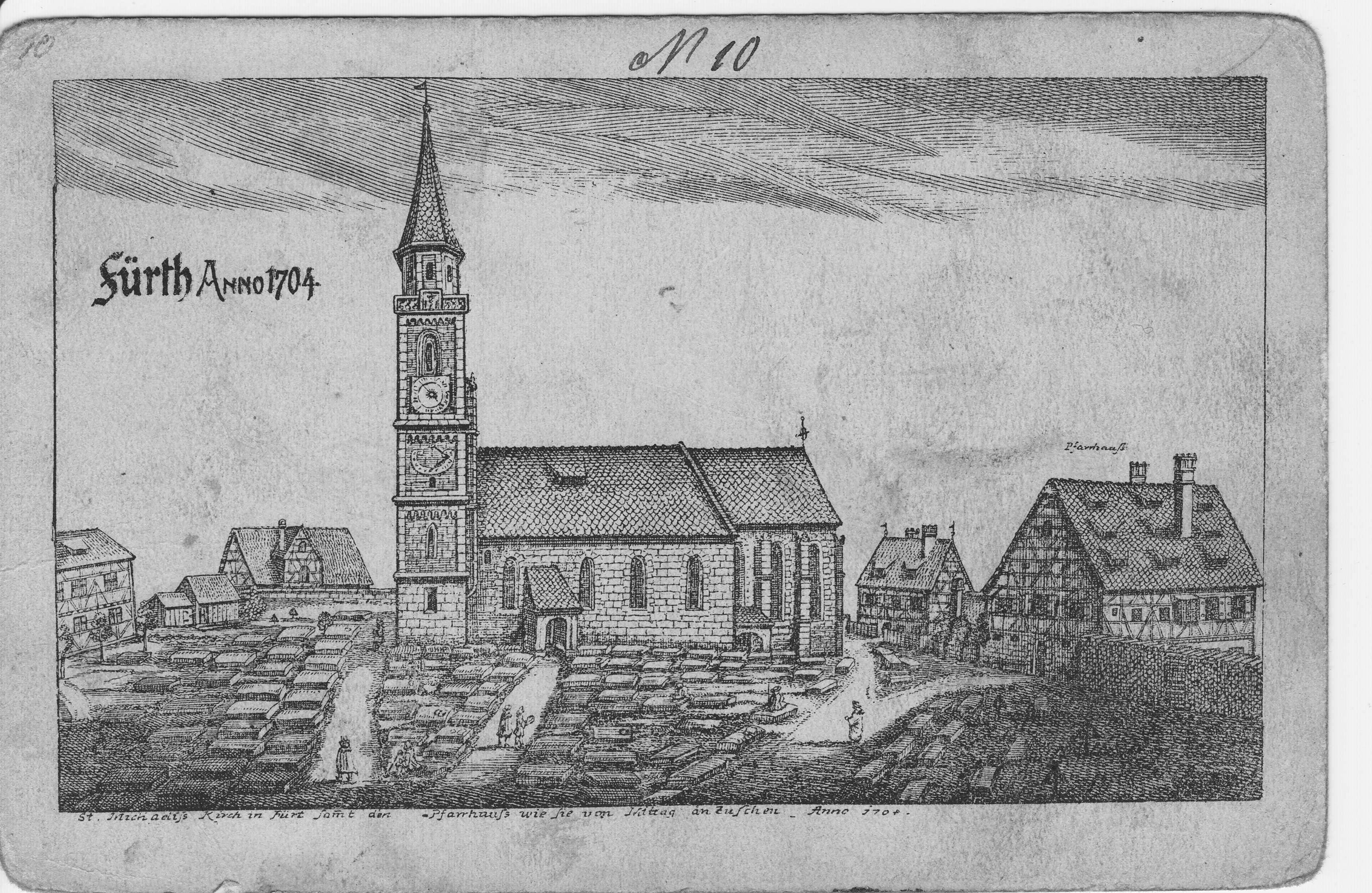 Stich von J.A. Boener aus dem Jahre 1704 auf einer Postkarte, Kirche St. Michael von Süden mit Friedhof